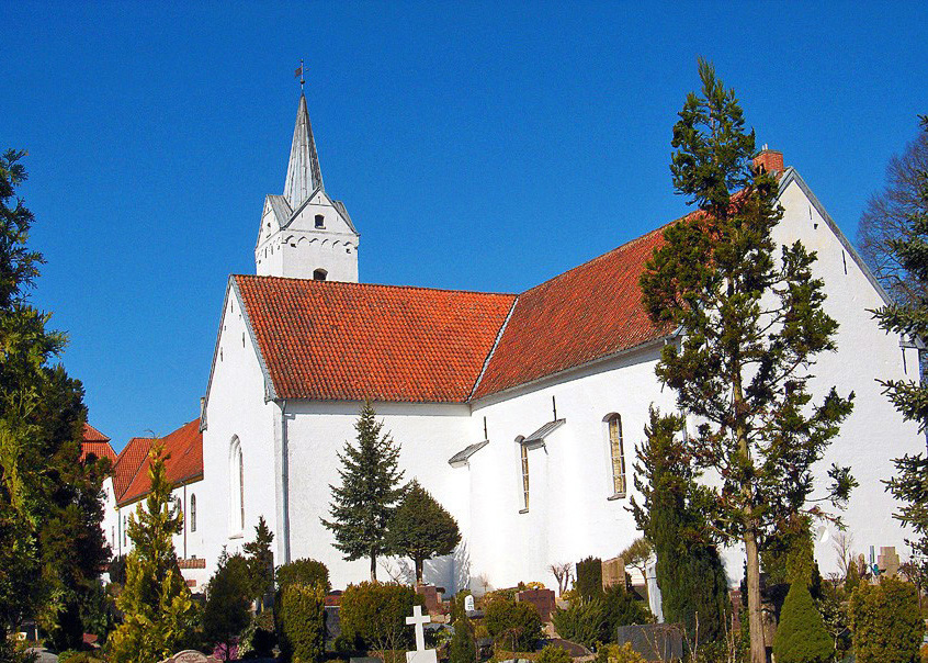 fra sydøst